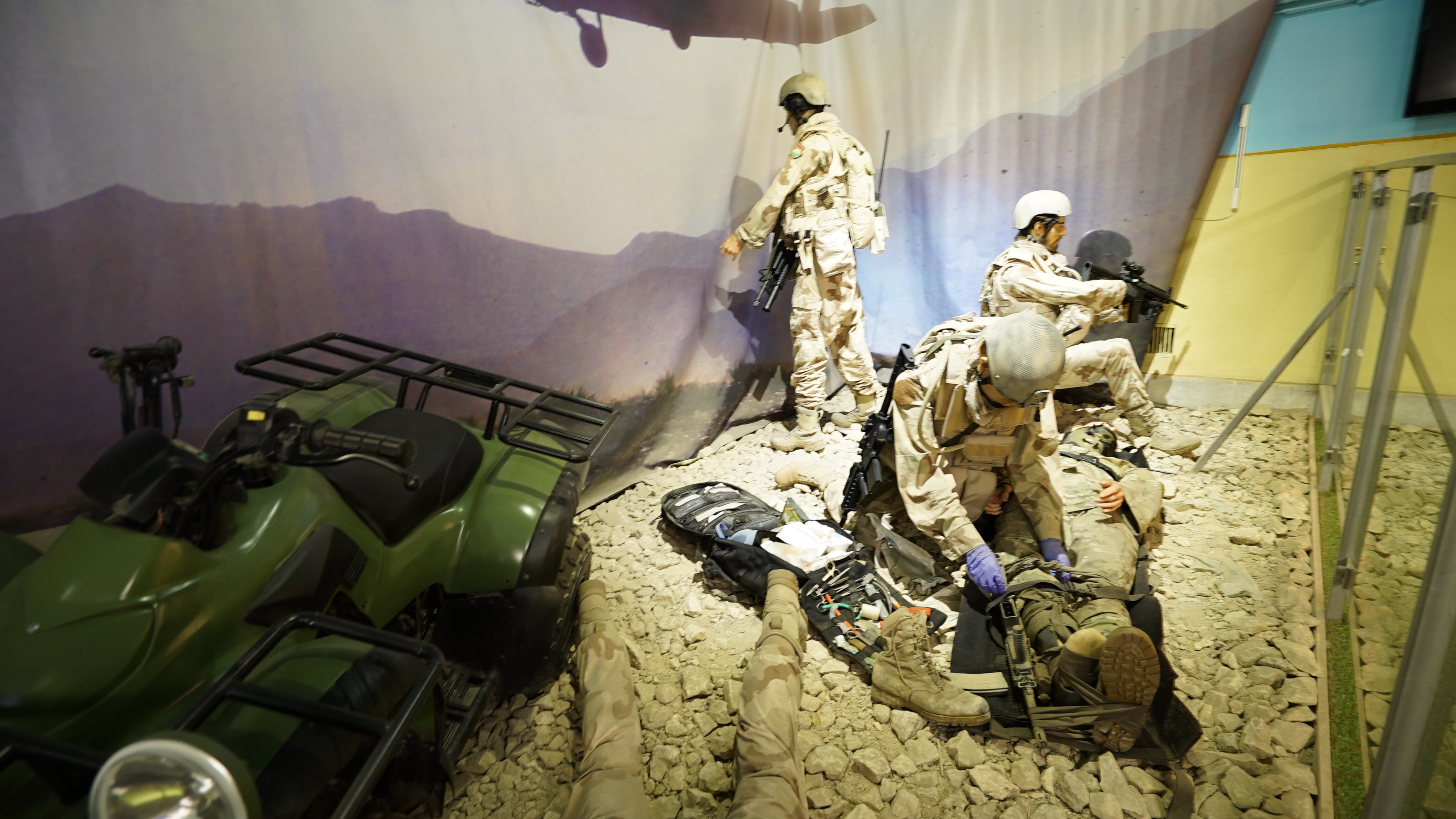 Orvosok a hadszíntéren